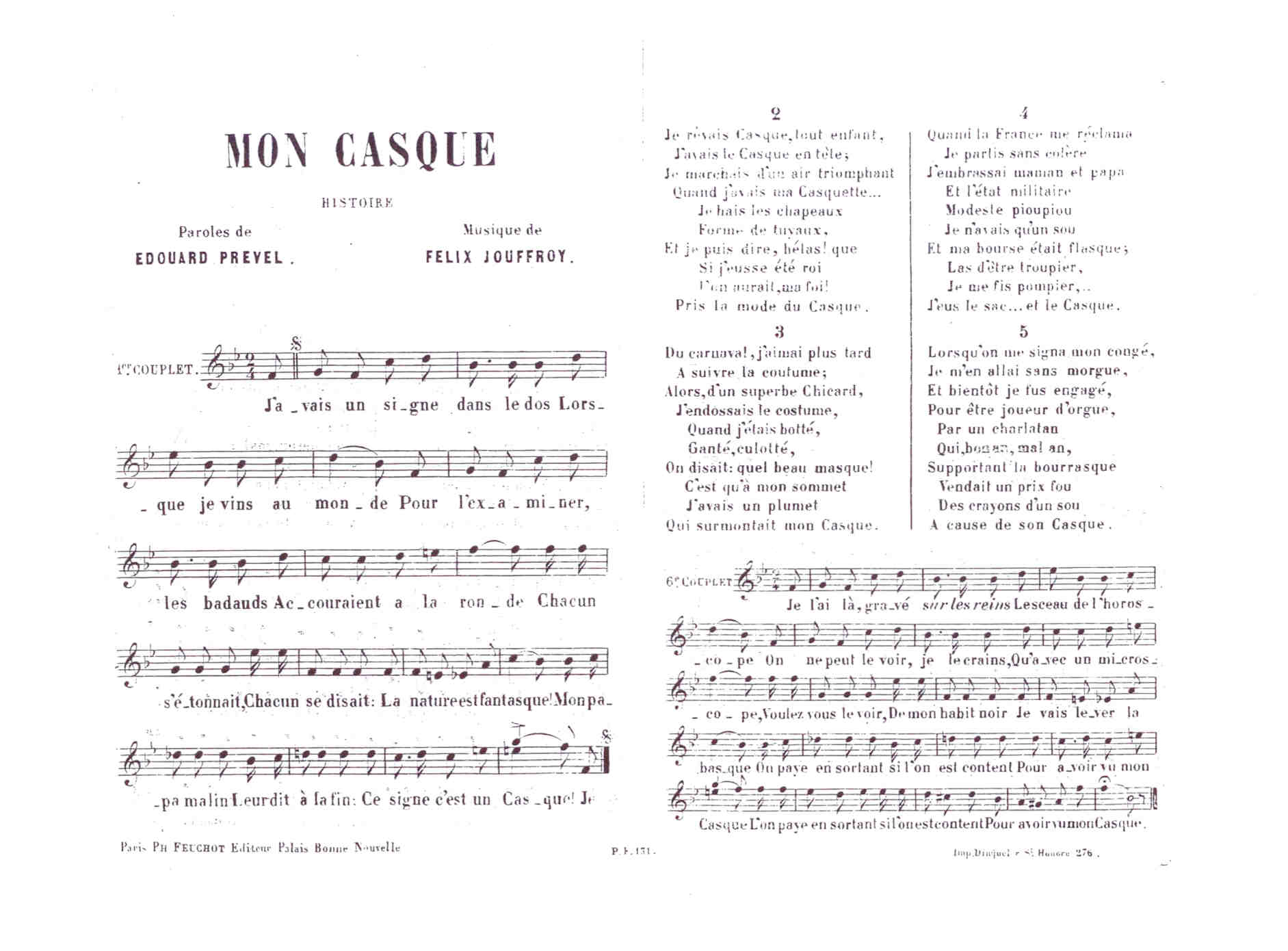 Paroles et musique de la chanson.